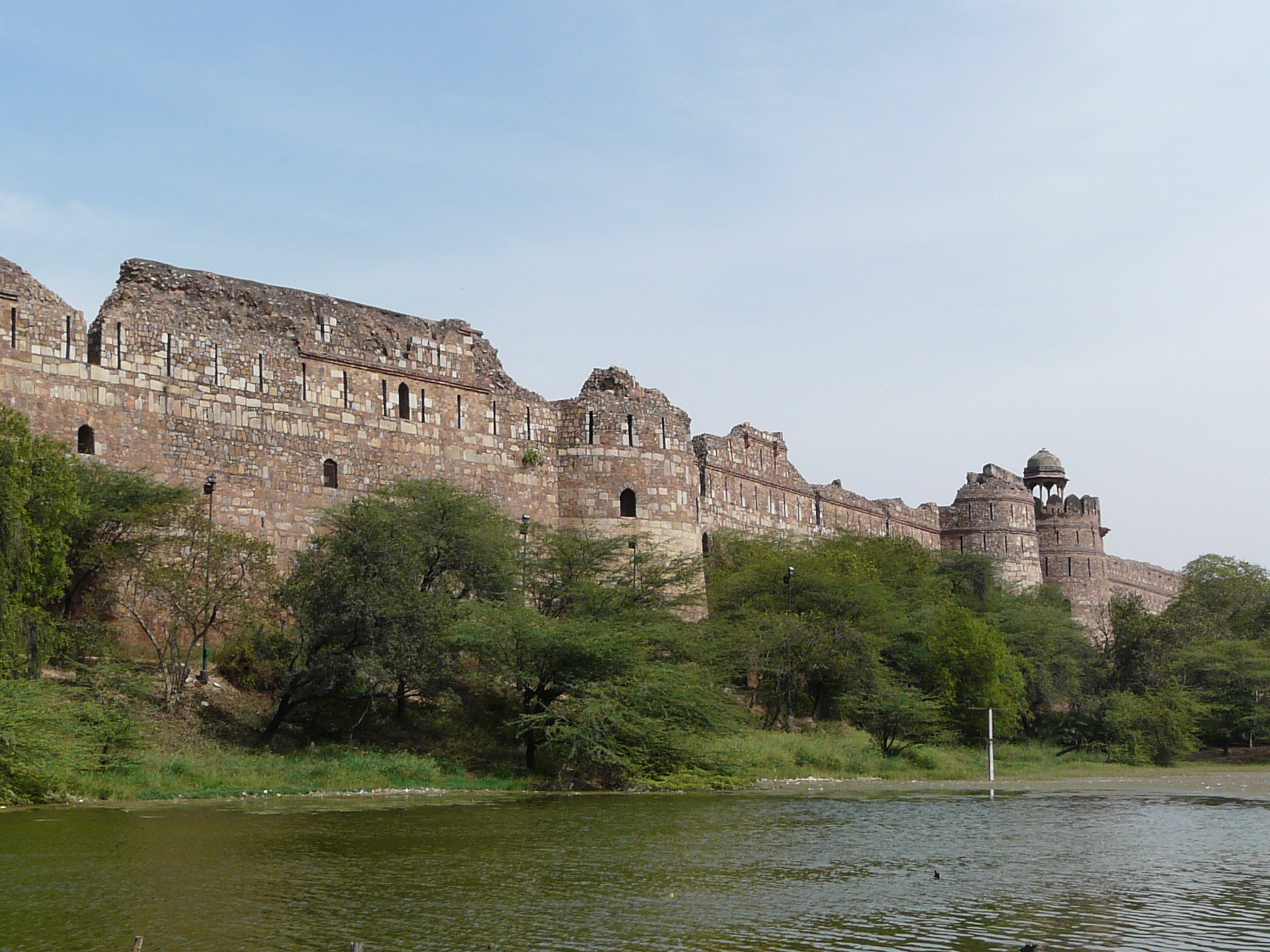 Purana Qila ramparts, Delhi.